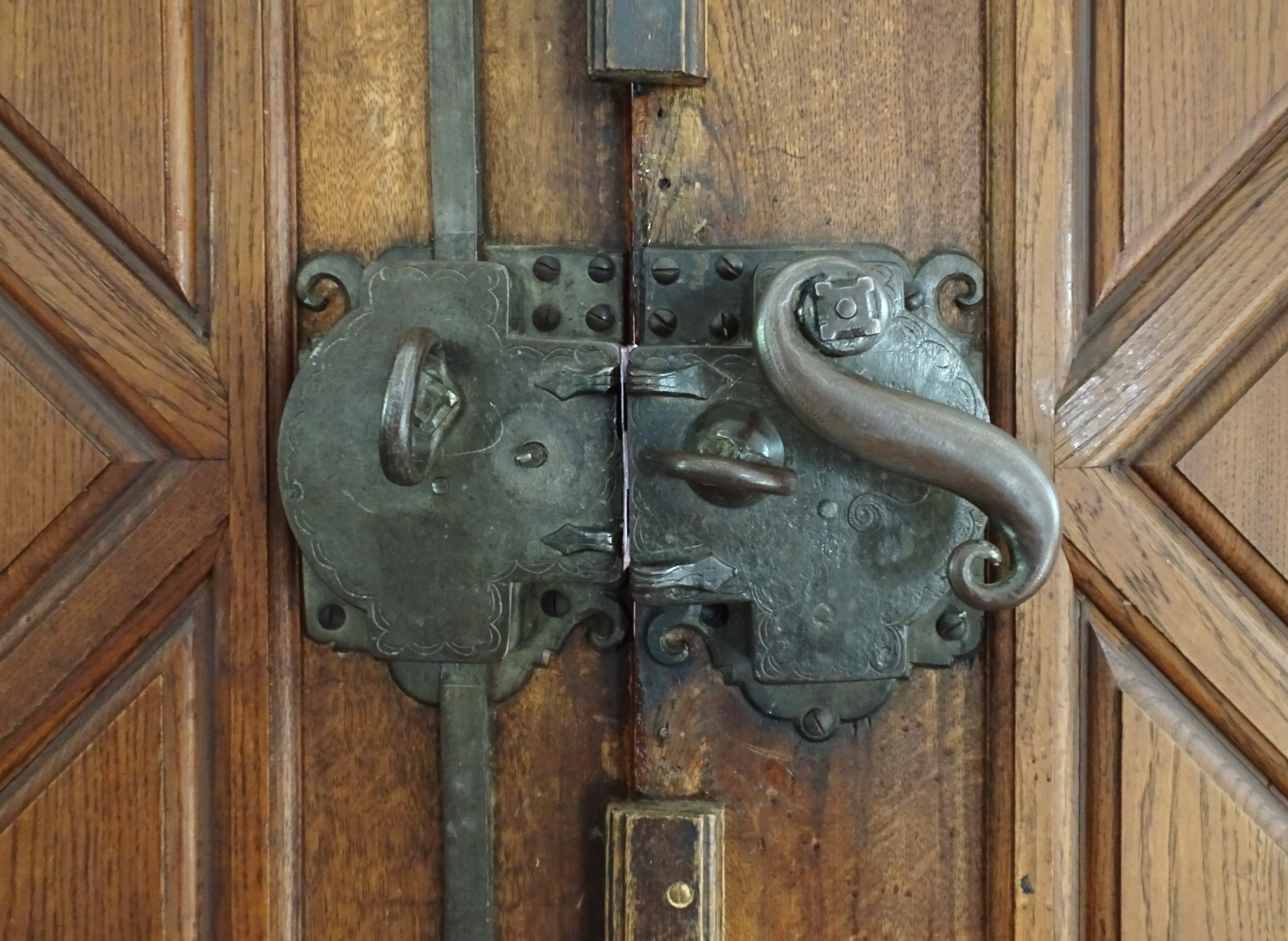 Årsta slott interiör, dörrlås